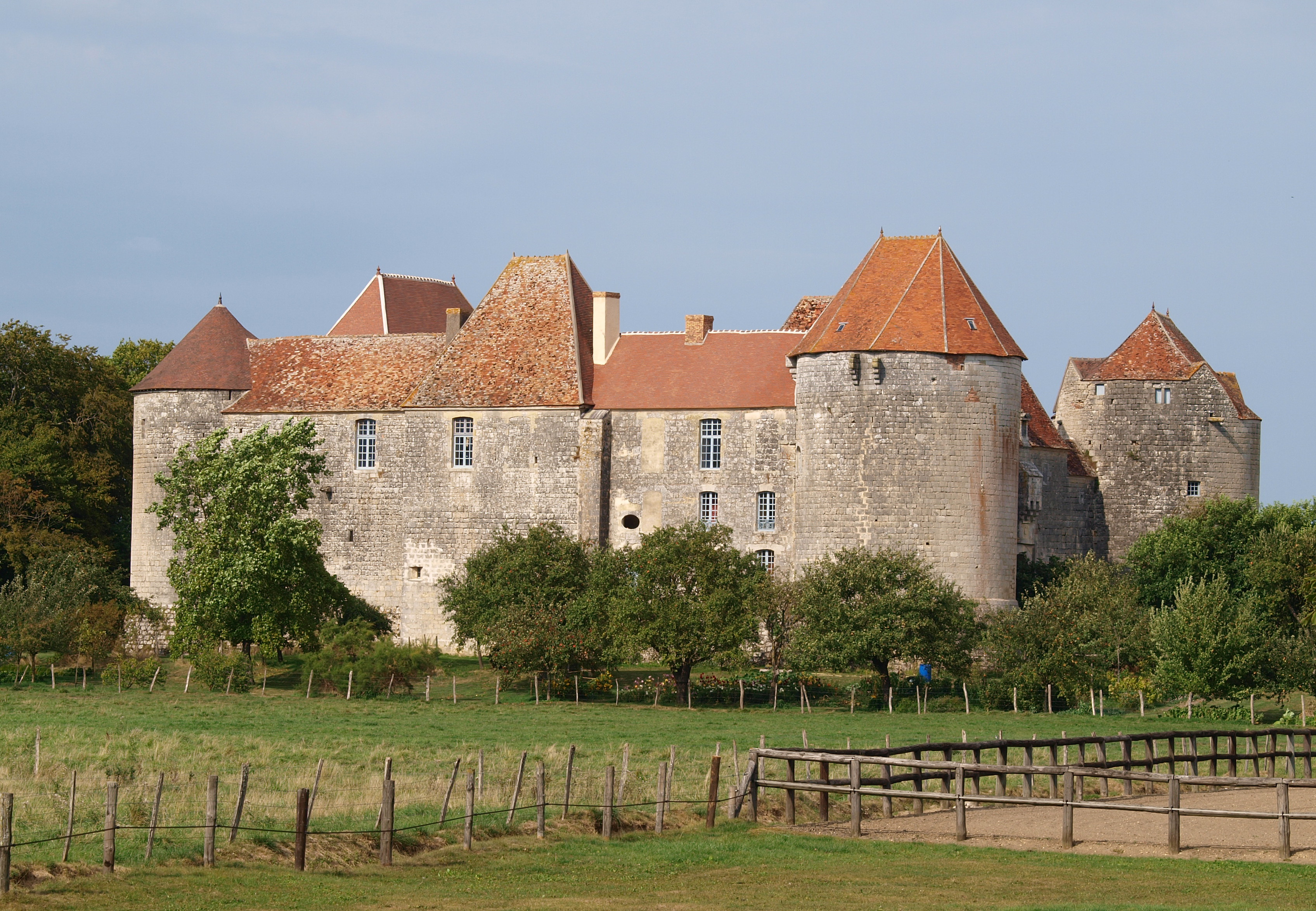 Perroy (Nièvre, France) ; le château de la Motte-Josserand